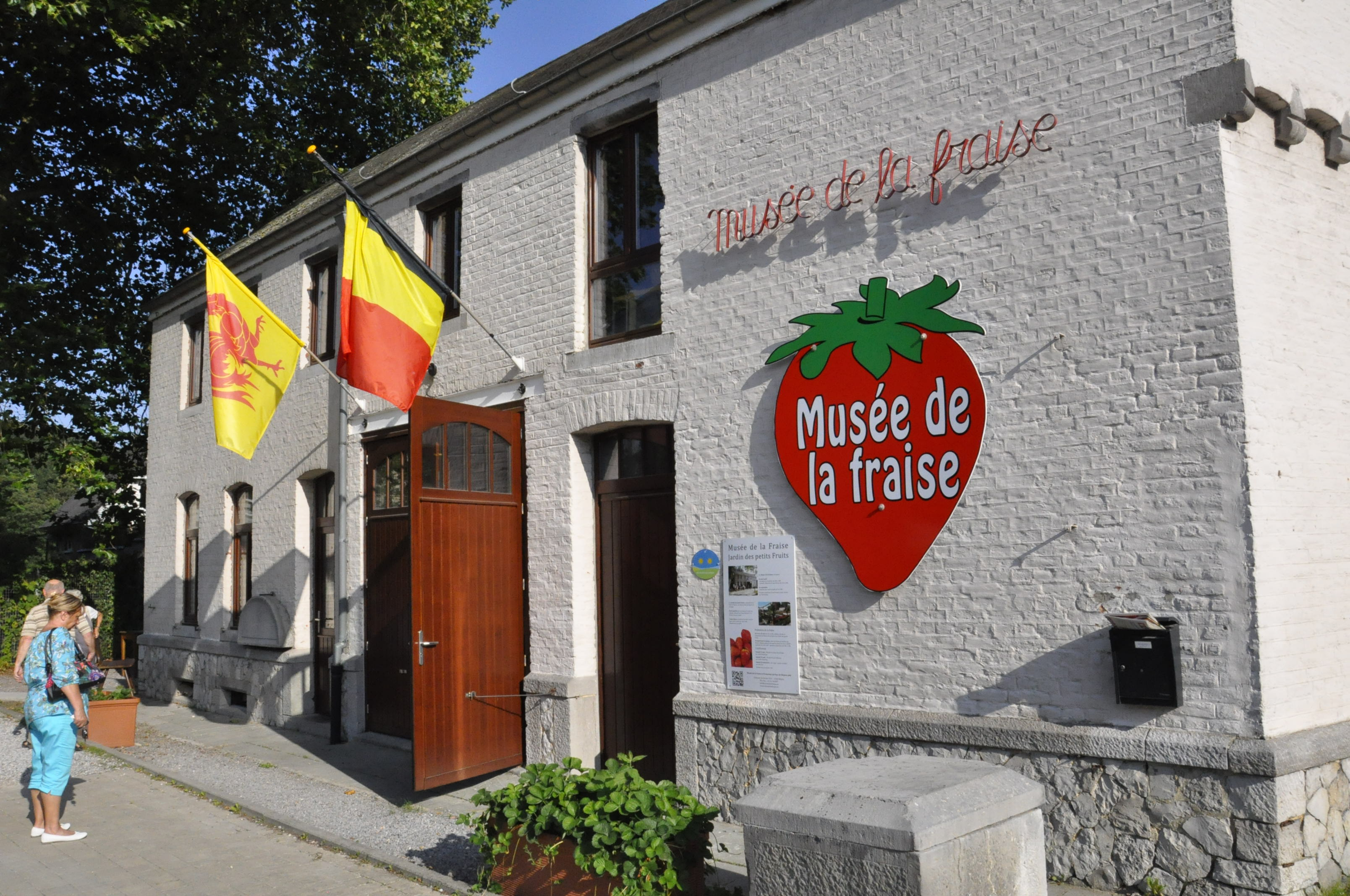 façade du Musée de la fraise à Wépion